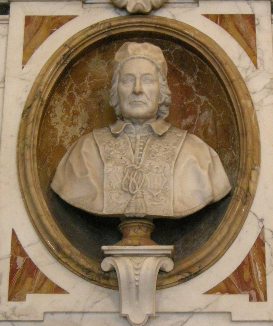 Santo spirito, cappella corsini, busto di clemente XII di girolamo ticciati